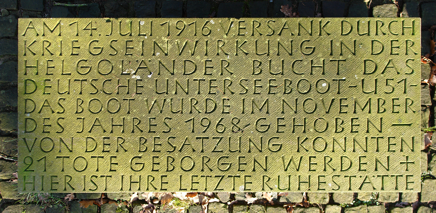 Osterholzer Friedhof in Bremen: Ehrenmal für 21 tote Besatzungsmitglieder des am 14. Juli 1916 untergegangenen U-Bootes U51. Das Schiff wurde 1968 gehoben, die geborgenen Toten hier begraben